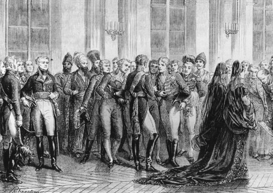 Le général Hédouville, ambassadeur de France à Moscou (…) à une réception diplomatique du tsar Alexandre